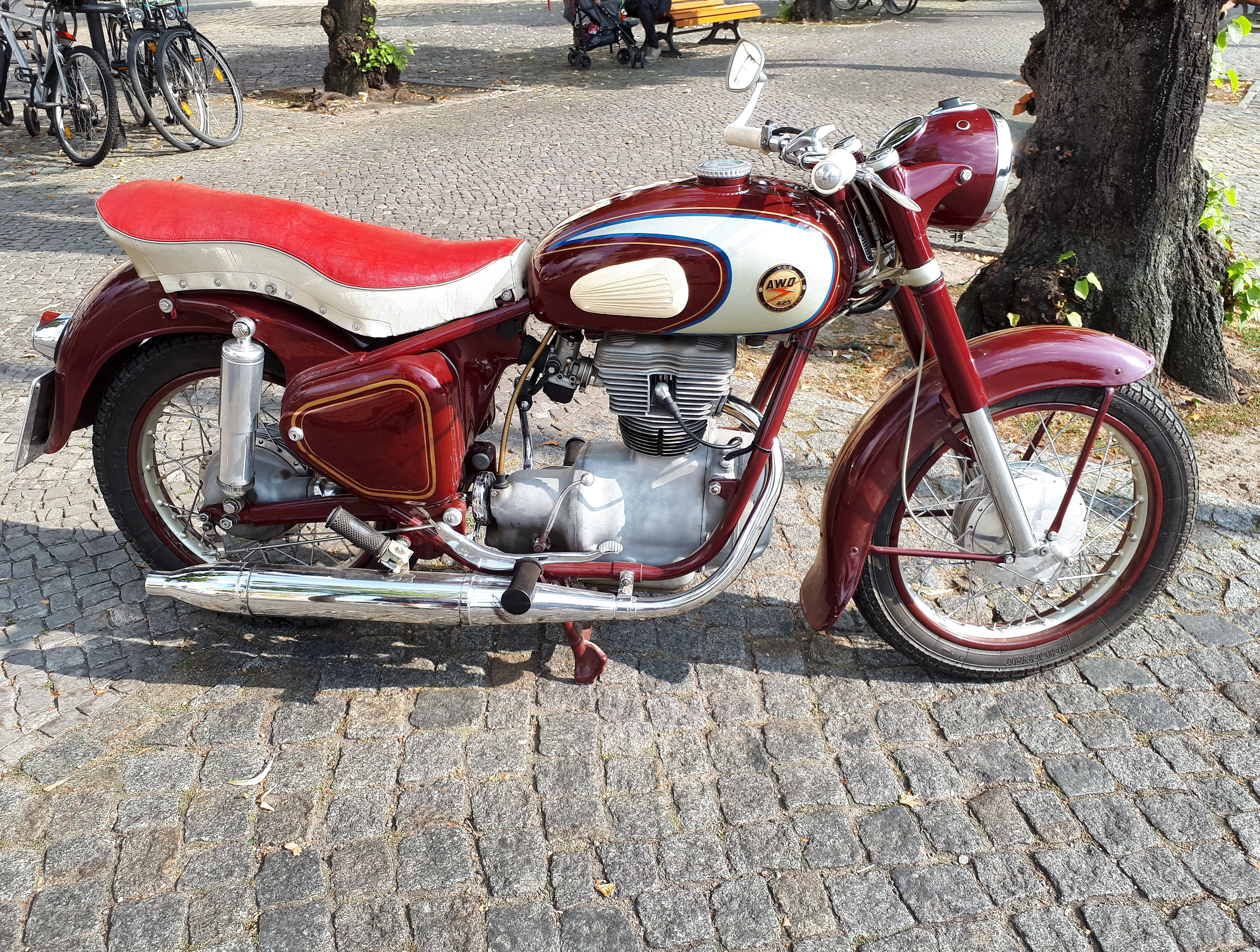 AWO 425 2019 in Potsdam